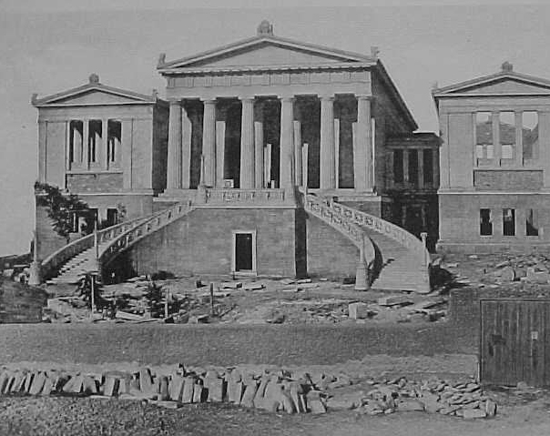 Ασπρόμαυρη φωτογραφία του κτιρίου της Βιβλιοθήκης c.1895